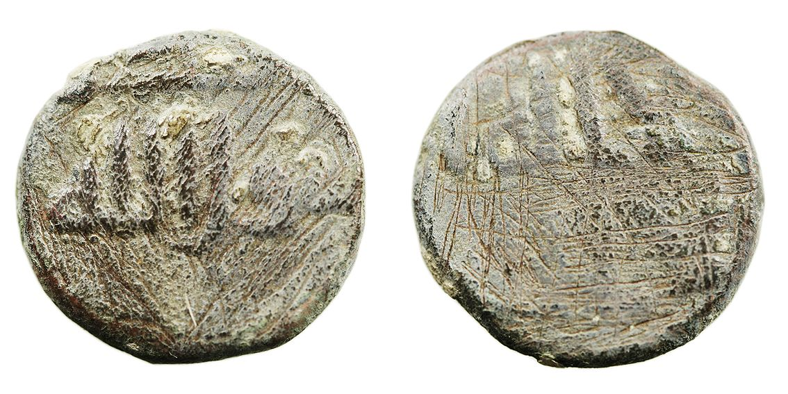 ACUÑACIONES EN COBRE. Felús. AE. Frochoso, nº II A. Rayas. BC+